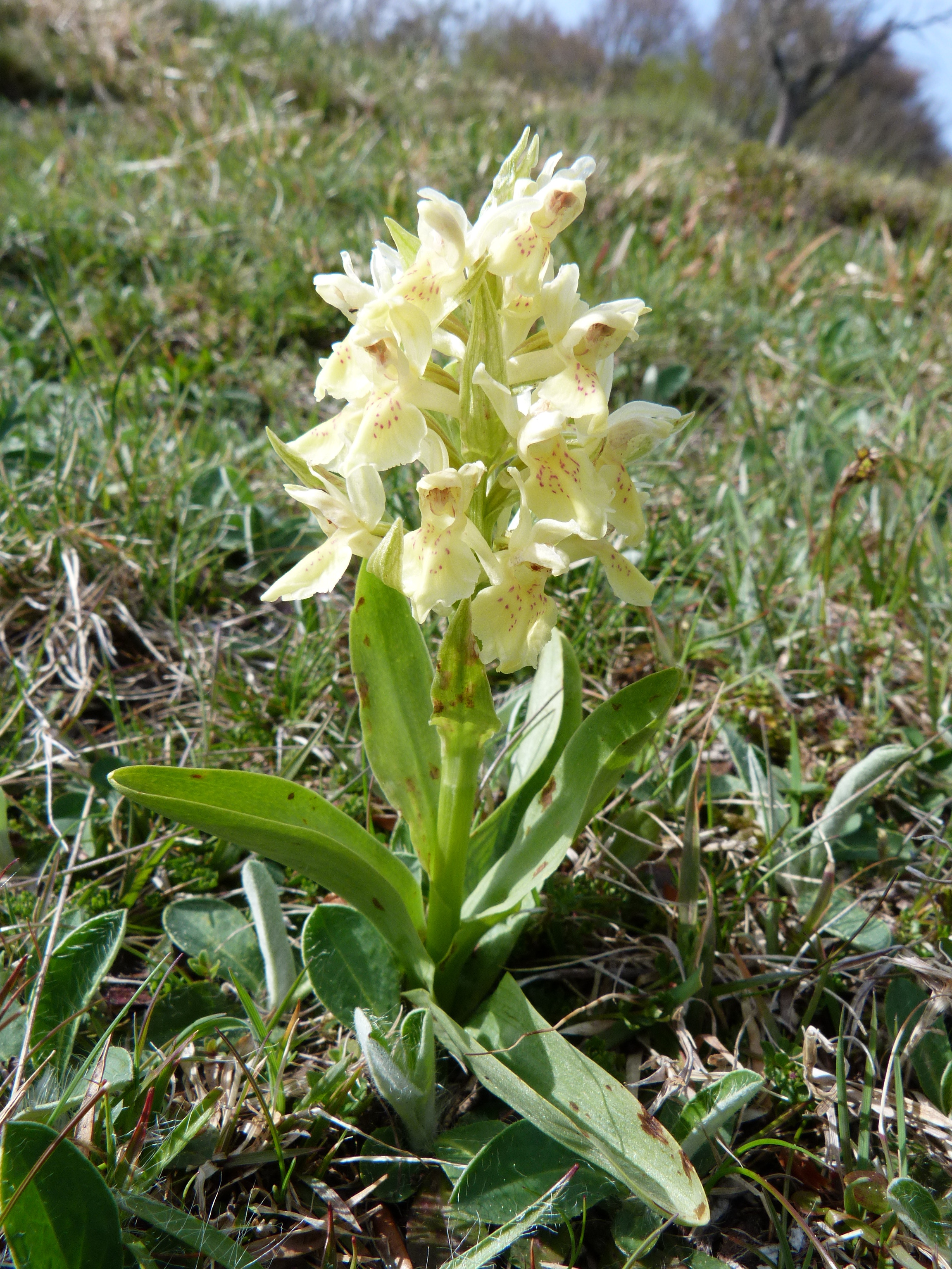 Orchis sureau jaune (Dactylorhiza sambucina), massif des Vosges (France).